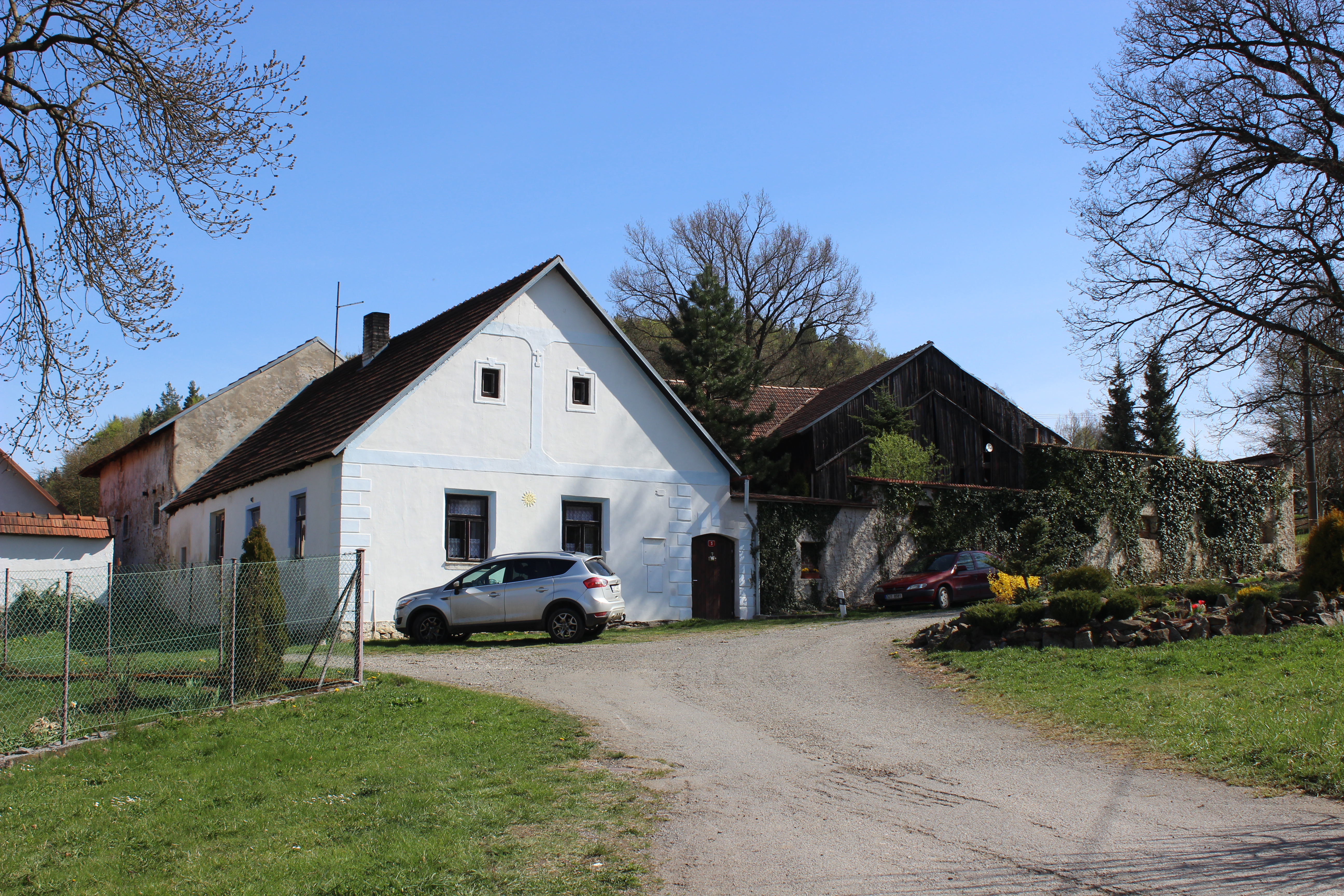 Dům číslo popisné 5 v Houserovce. Project: Fotíme Česko.